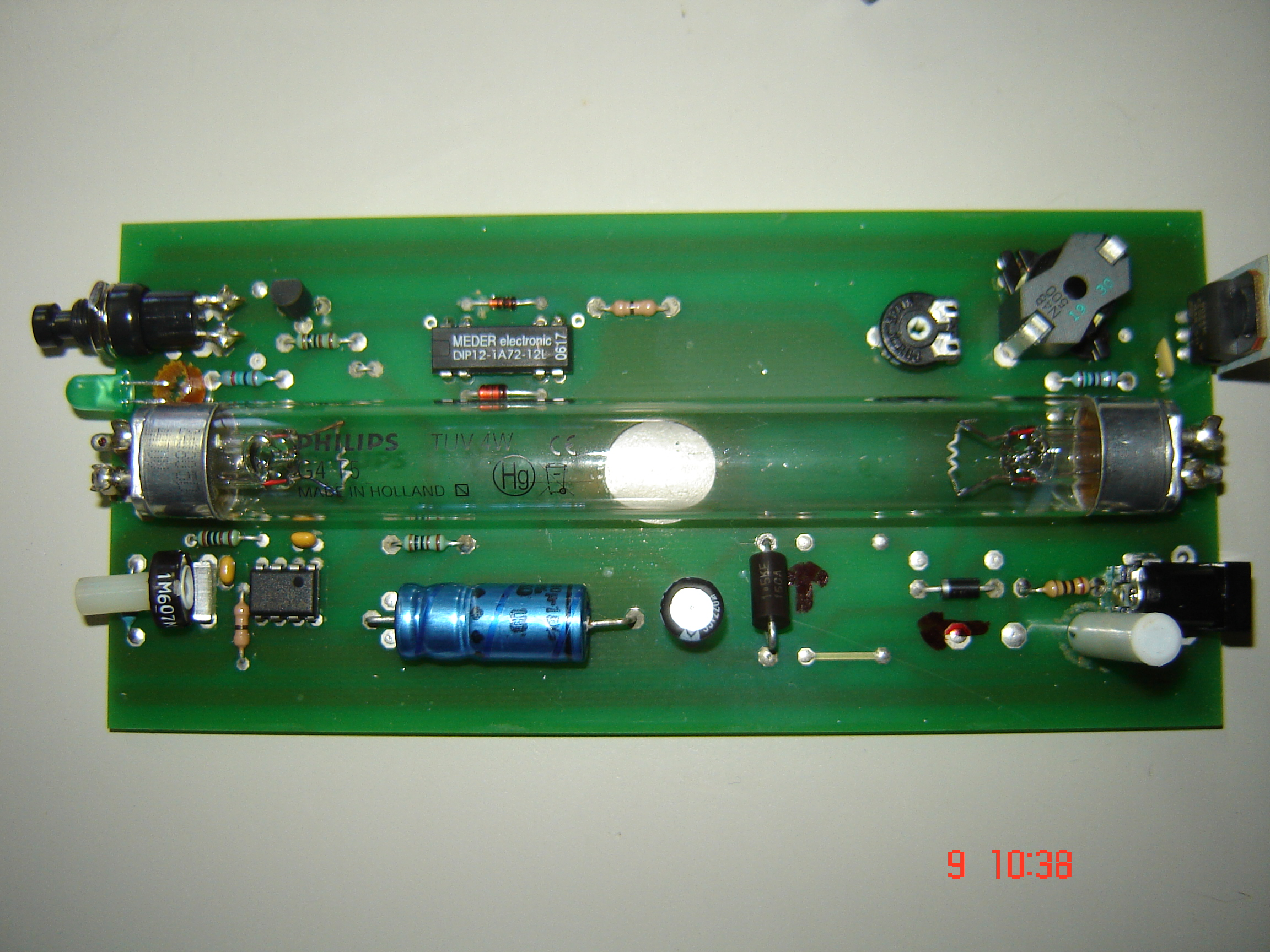 lampara borradora de eprom